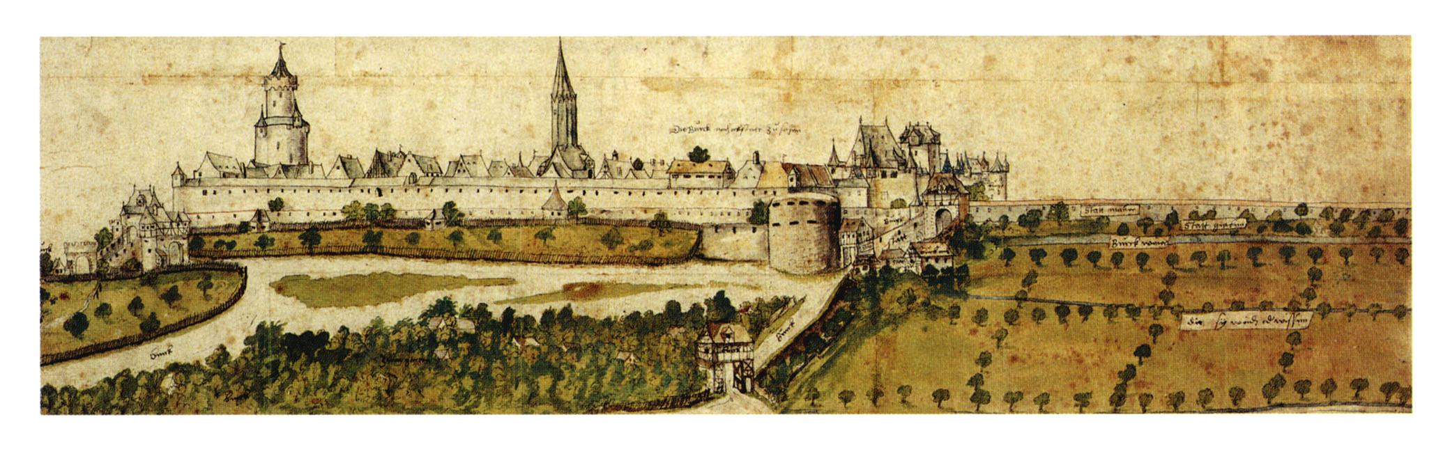 Burg Friedberg von Westen. Aquarell auf Papier von Hans Döring 1553. Wetterau-Museum Friedberg, Inv. Nr. A.1.1553-2.